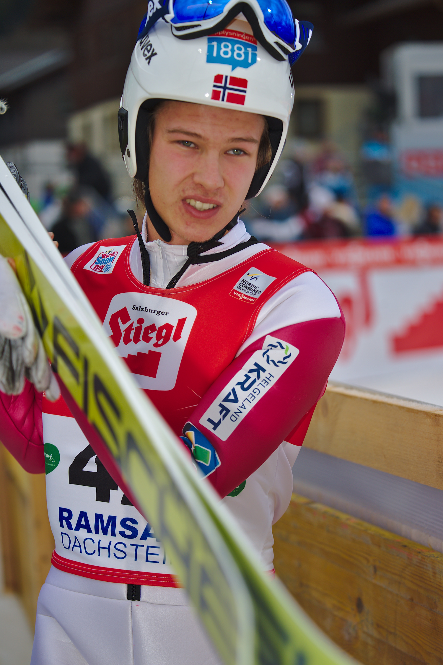 Espen Andersen (NOR)